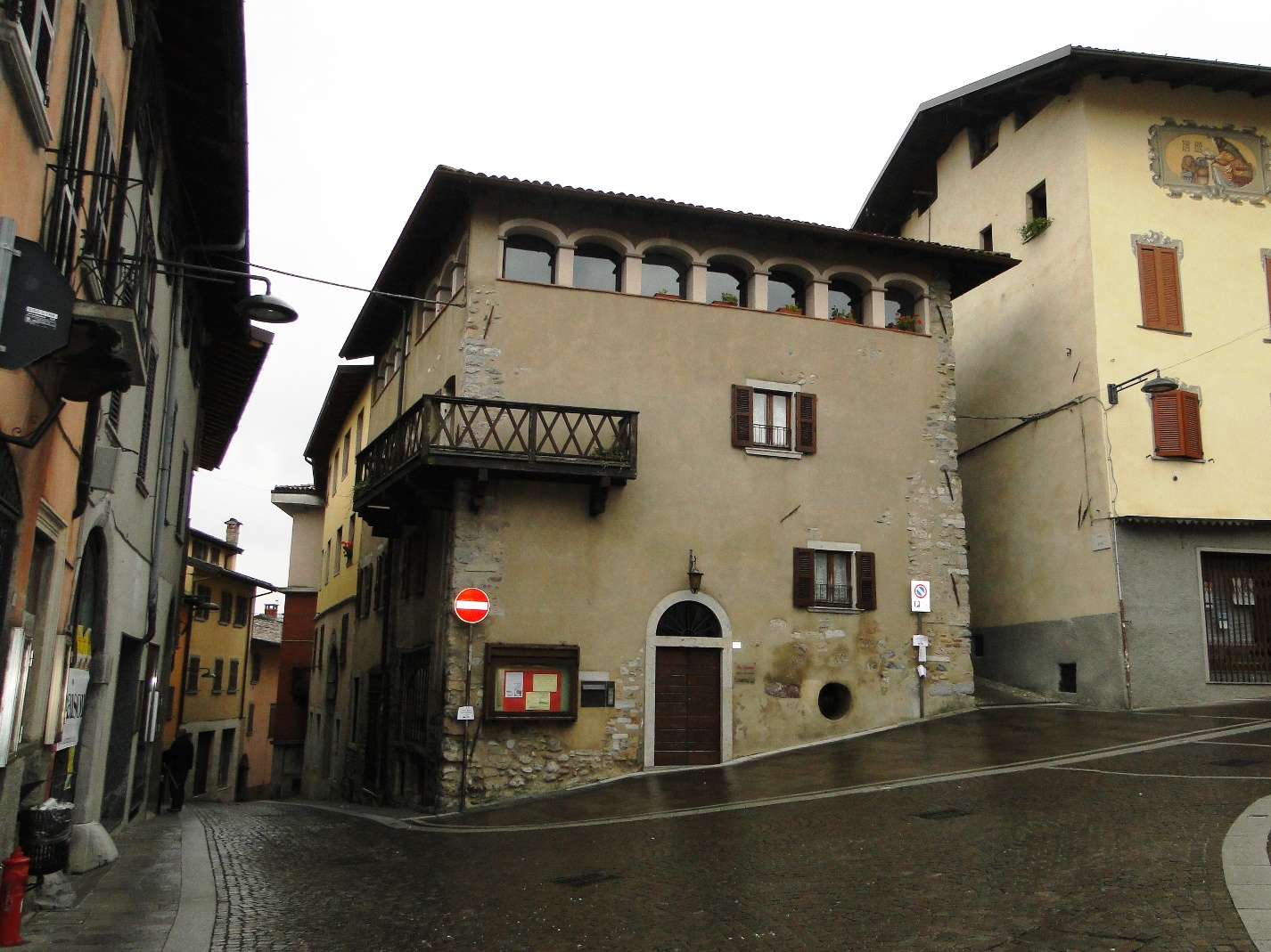 Sede Pro-Vertova, XIV-XV sec. Vertova (BG). Italia